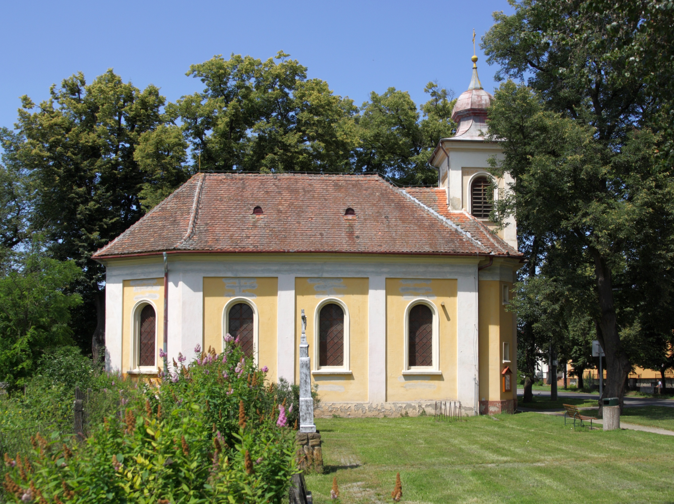 Rajhradice - kaple sv Scholastiky.